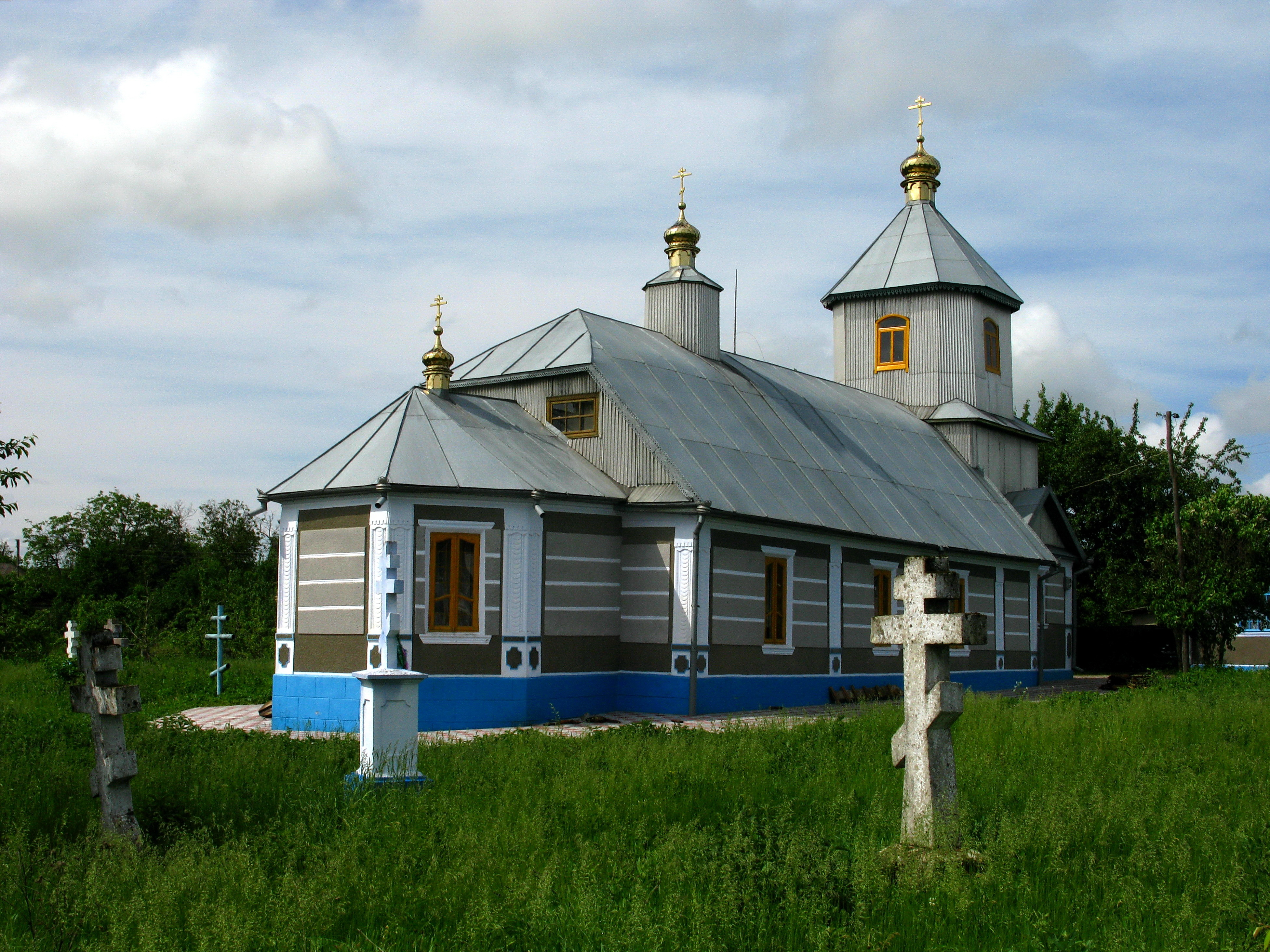 Старообрядська (Святомиколаївська) церква (дер.), с. Бiлоусiвка